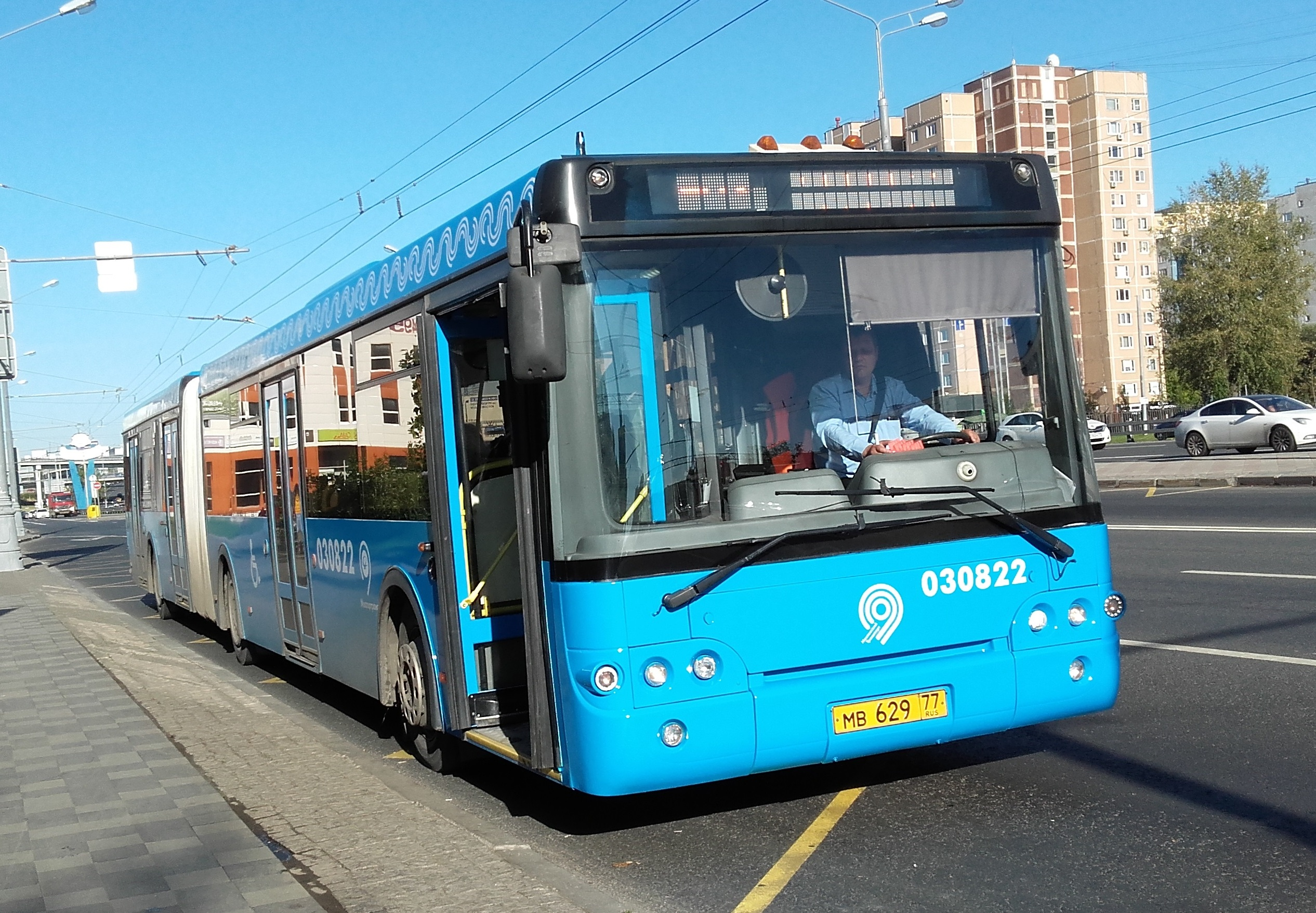 Автобус ЛиАЗ-6213 маршрута 903 на Ярославском шоссе